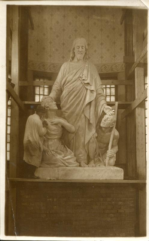 Muuseumikogu Fotokogu Muuseumikogu Fotokogu sisu kirjeldus Skulptor Amandus Adamson (1855-1929) teosega "Kristus, pime ja Maarja Magdaleena" Tartu Pauluse kirikus.